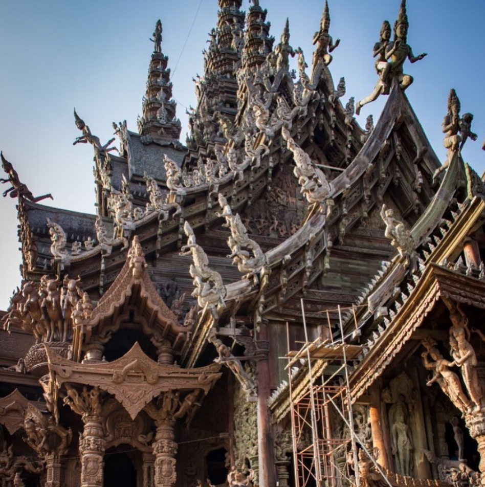 Храм Истины. Паттайя, Таиланд